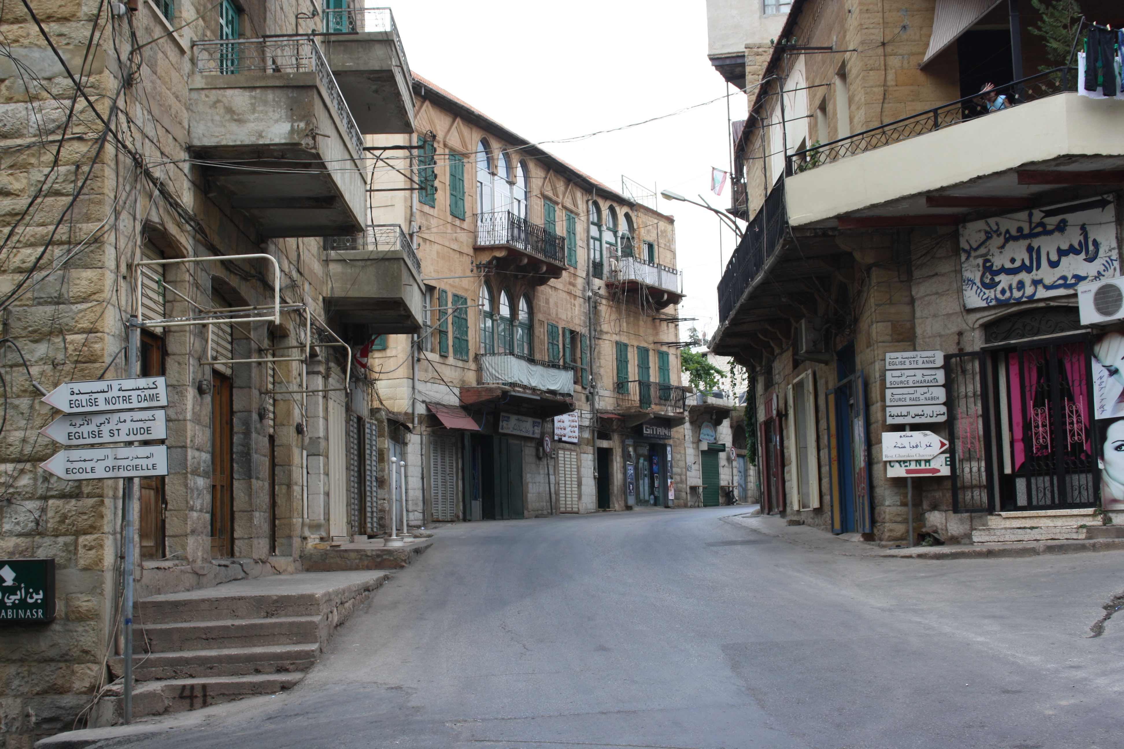 Hasroun main road into the village